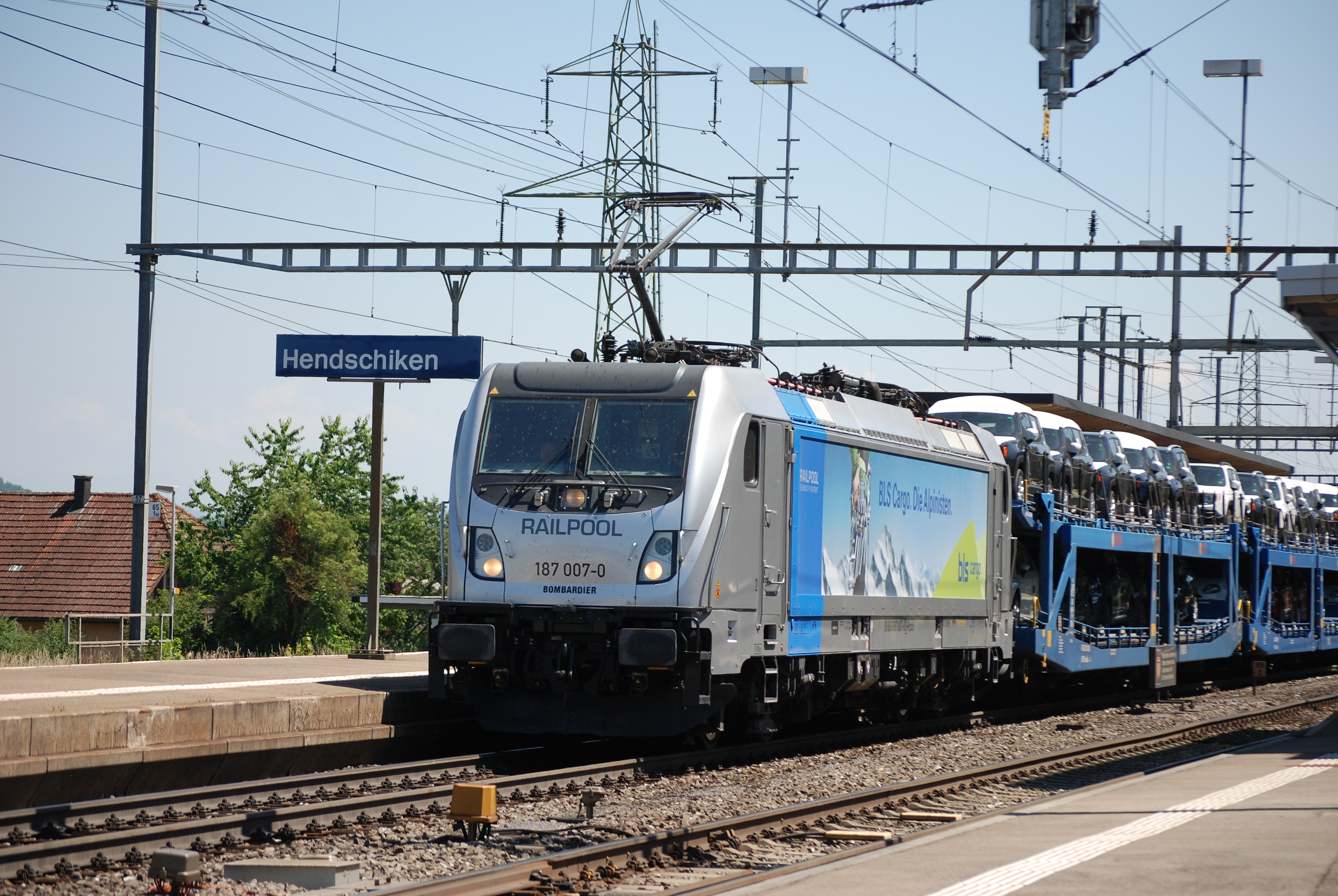 Railpool BR 187 007